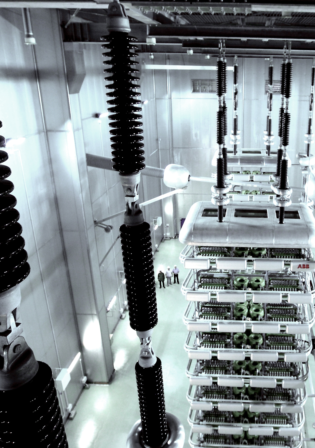 In secondo piano: bobina di spianamento in corrente continua; in primo piano: in rosso, collegamento del TA ottico per la misura della corrente continua. Impianto di conversione di Latina del collegamento HVDC "SAPEI".